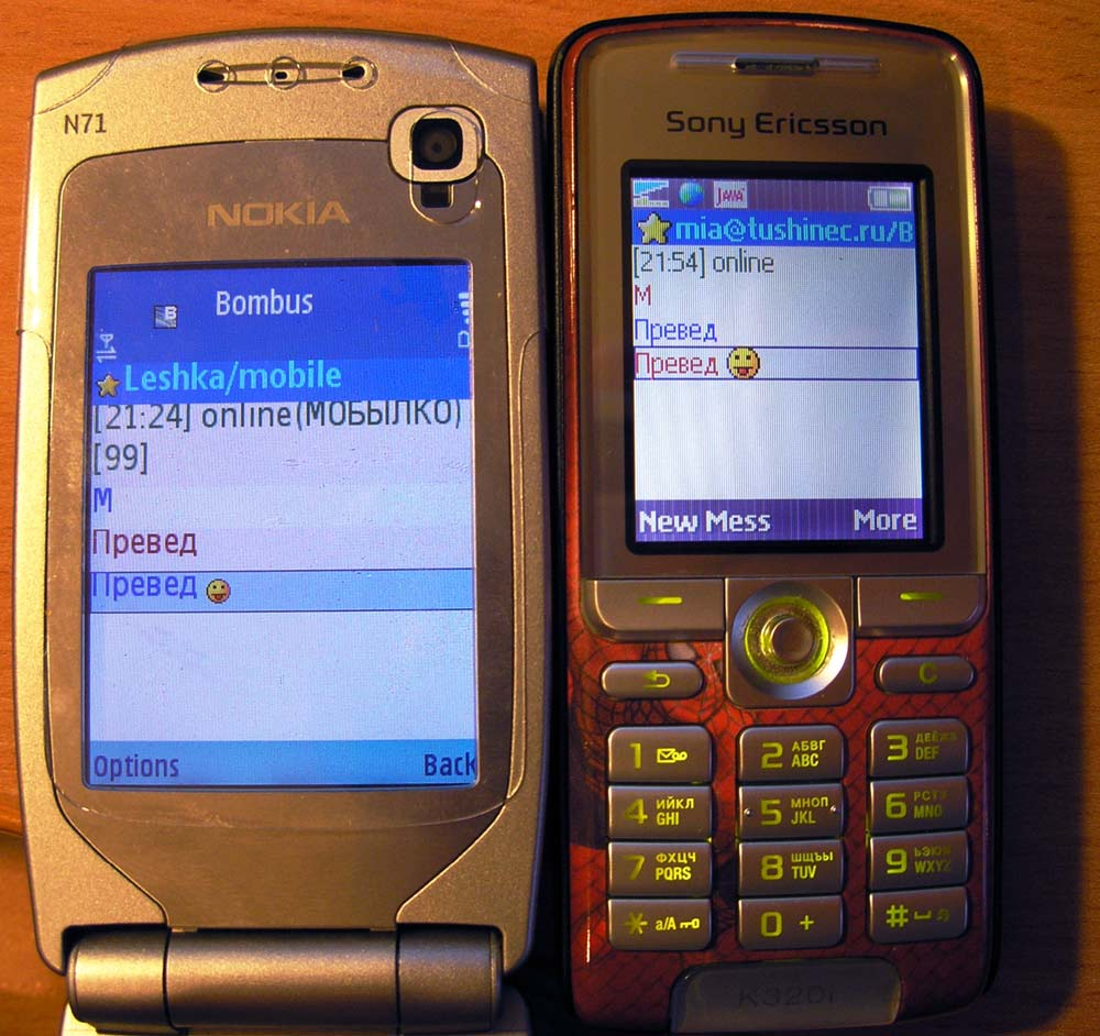 Мобильные телефоны с Bombus Bombus на Nokia N71 и Sony Ericsson K310i